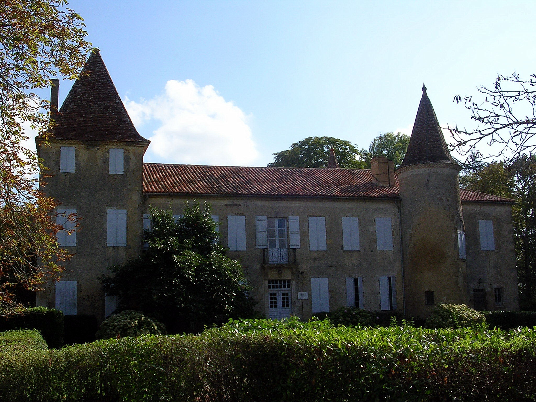 Château de Castelmore, à Lupiac, Gers. Photo prise par Jibi44. Ce château privé est le lieu de naissance du célèbre d'Artagnan, de son vrai nom Charles de Batz de Castelmore.